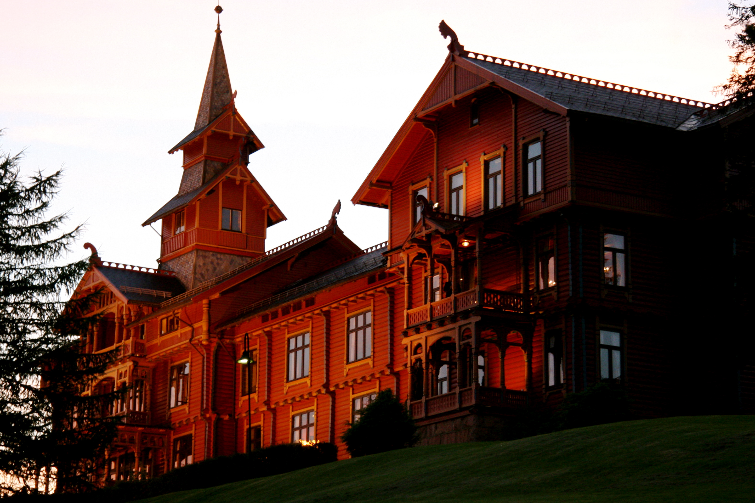 Holmenkollen, Oslo.